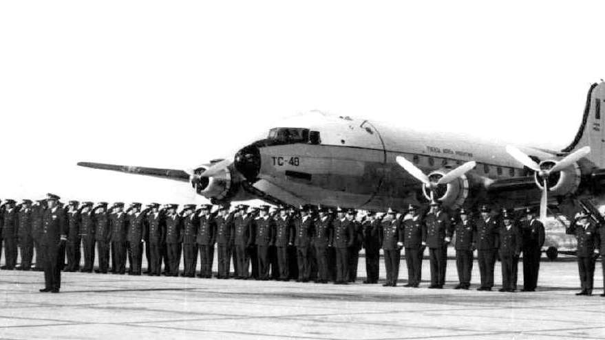 El grupo de cadetes y sus jefes en el aeropuerto El Plumerillo, antes de embarcar en misión de instrucción, en noviembre de 1965